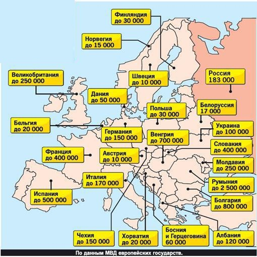 Численность цыган в европе